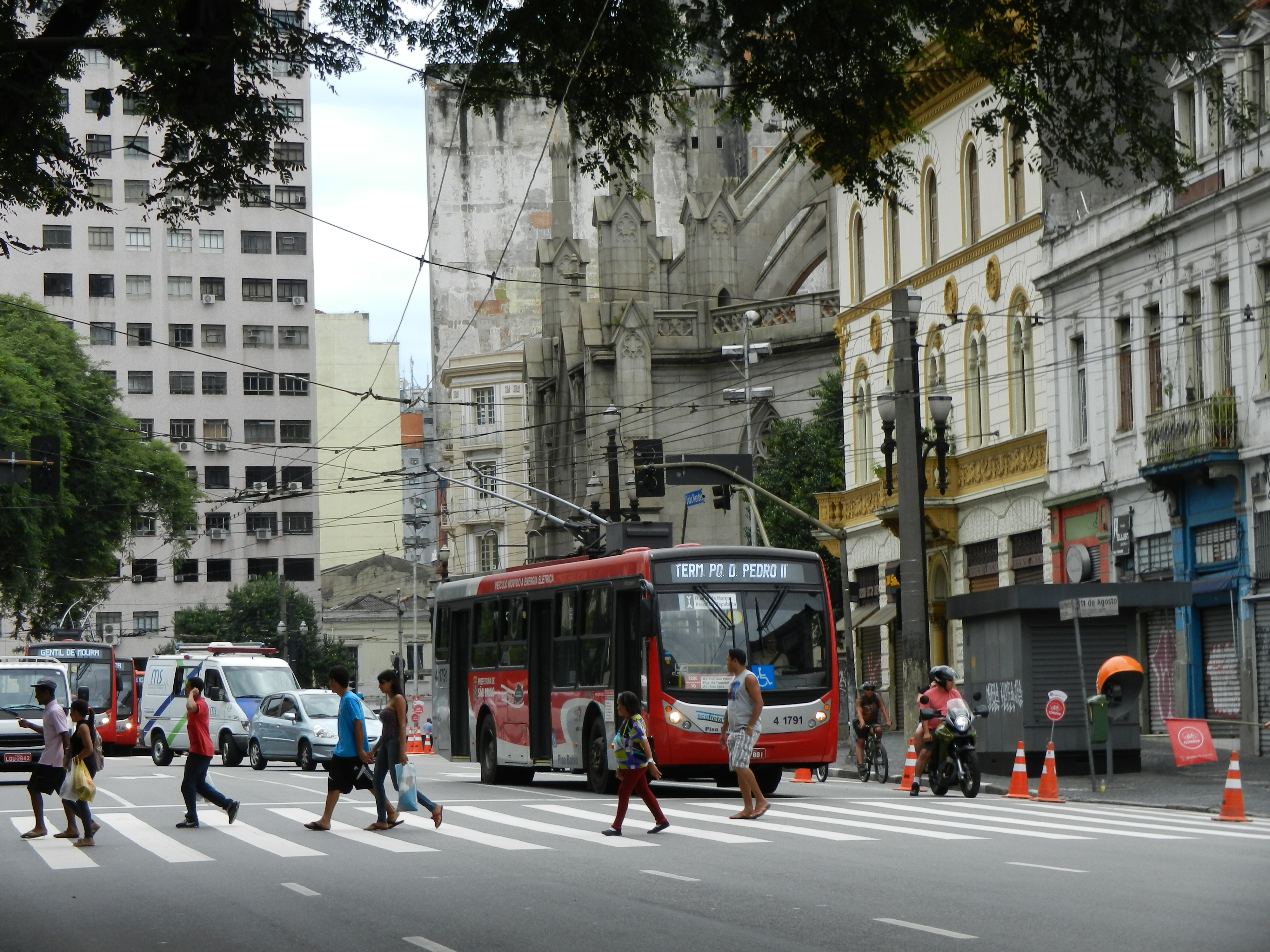 Trólebus na Praça João Mendes